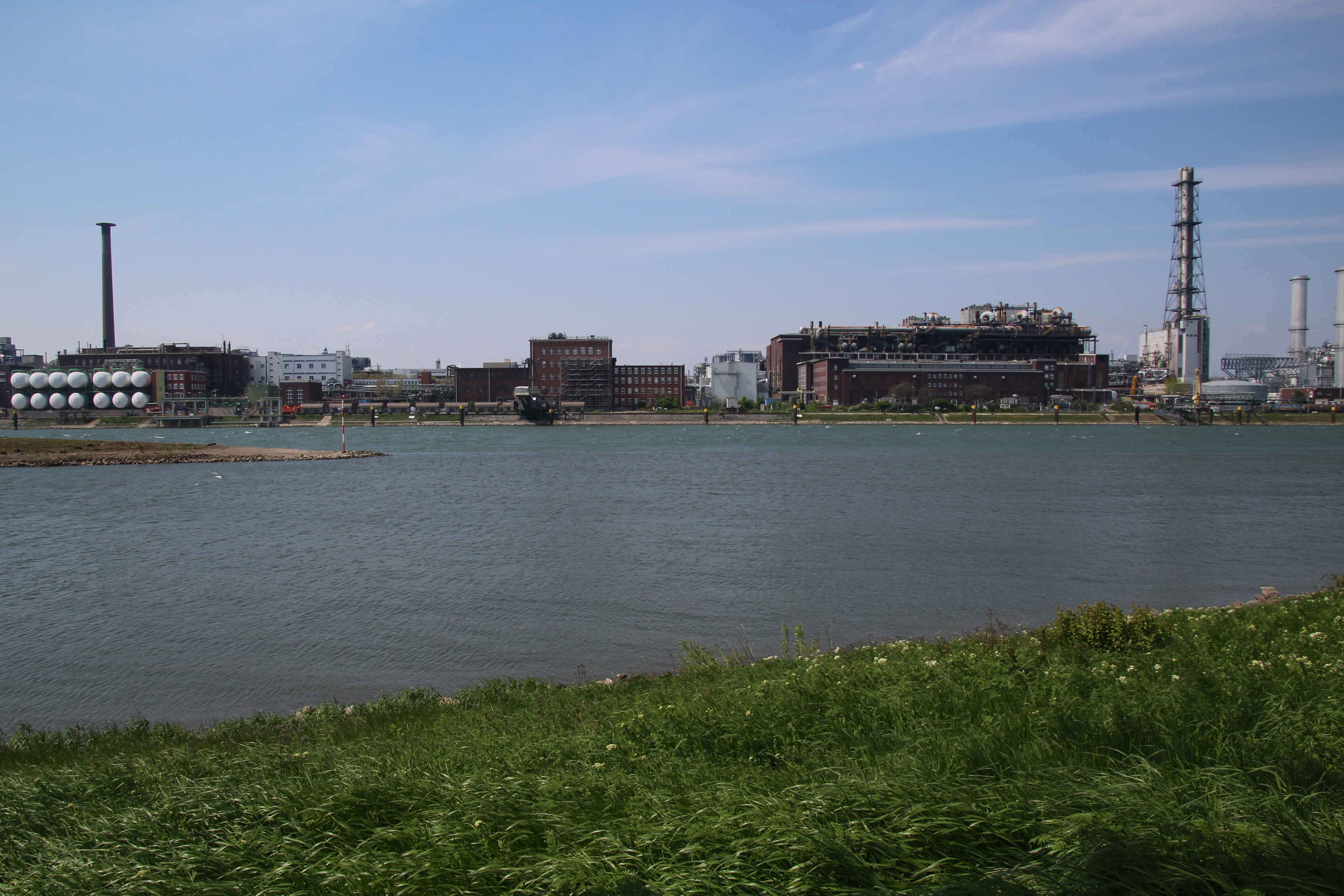 Neckarmündung. Im Vordergrund der Neckar. Im Hintergrund der Rhein. Fließrichtung von links nach rechts. Auffällig die unterschiedliche Färbung des Wassers (Neckar leicht grünlich; Rhein etwas bräunlich).